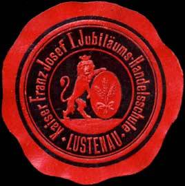 Sealing stamp Title: Kaiser Franz Josef I. Jubiläums-Handelsschule - Lustenau Description: rot, schwarz, geprägt Place: Lustenau size: 4 cm